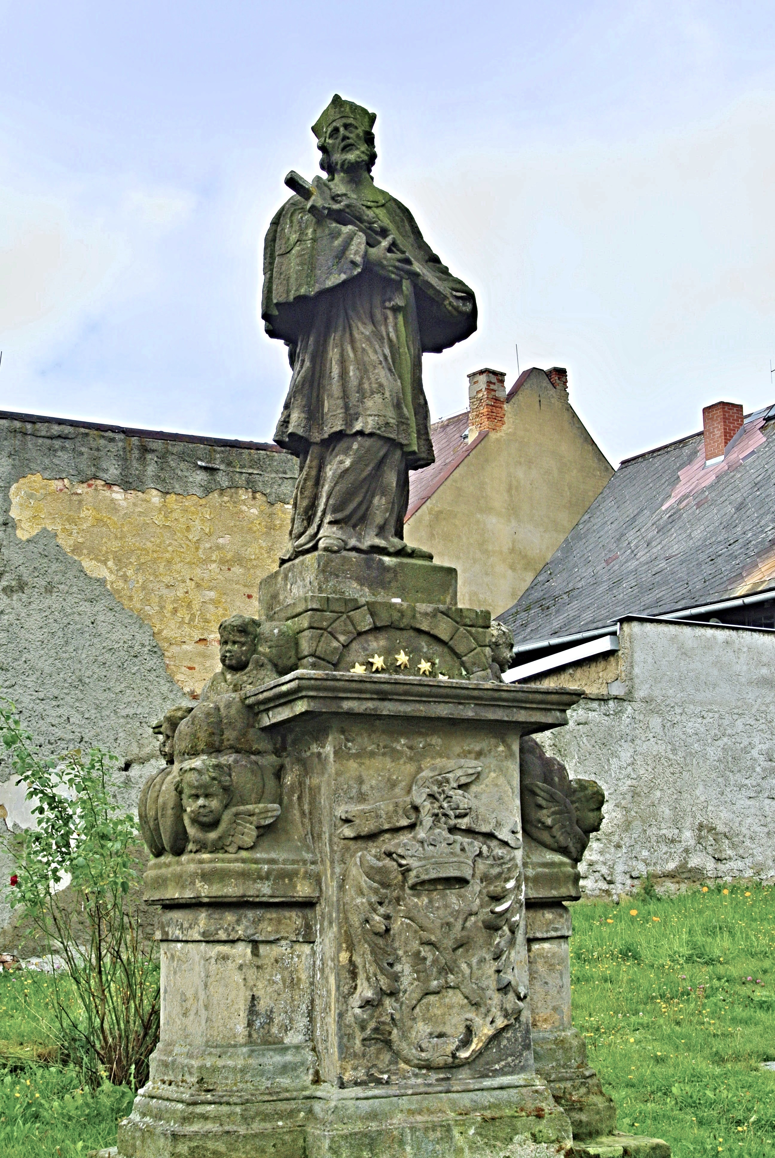 Sochy svatého Jana Nepomuckého a svaté Zdislavy, Dominikánské náměstí, Jablonné v Podještědí.